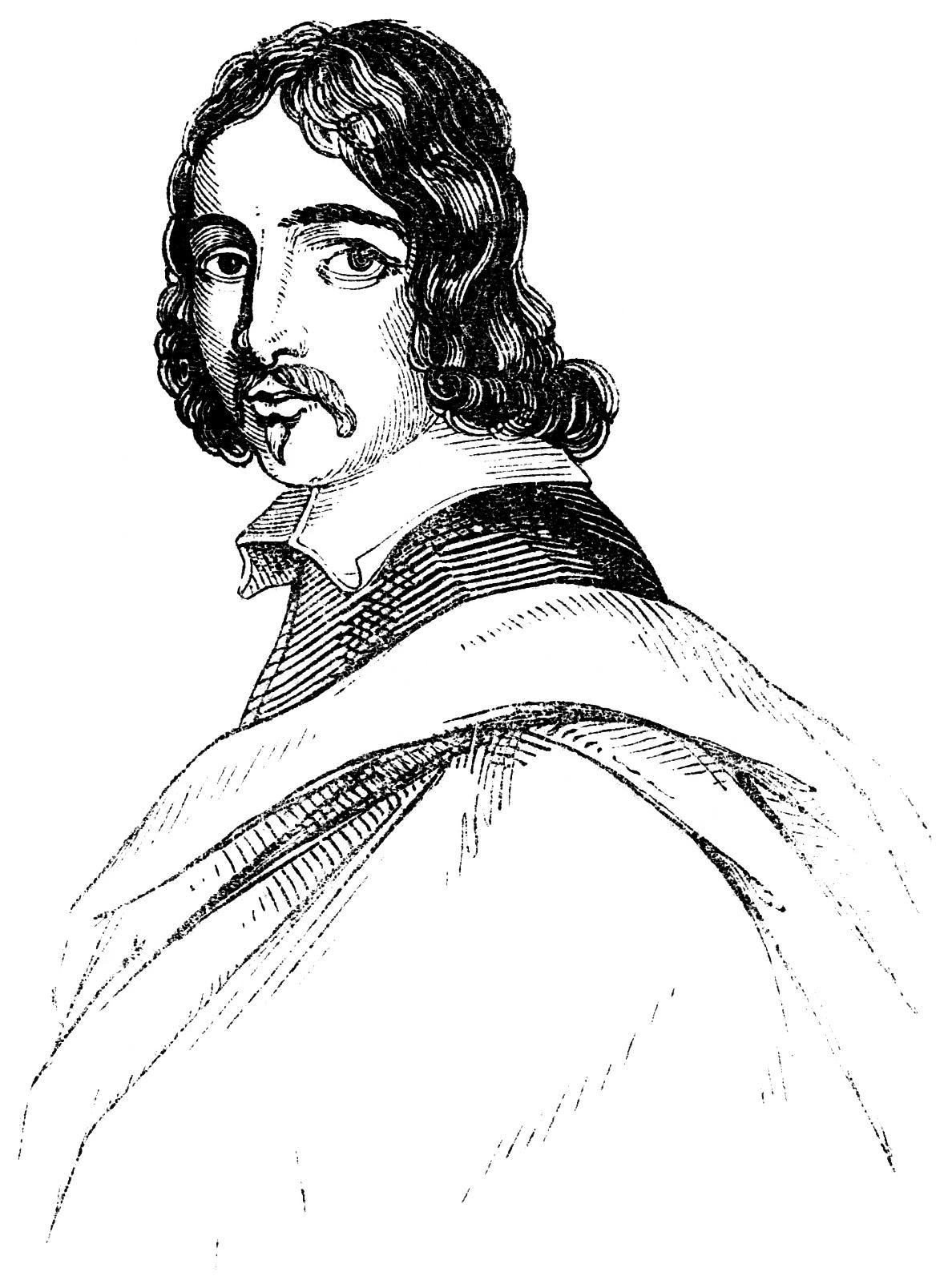 Francis Moore